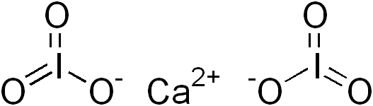 chemical structure of calcium iodate